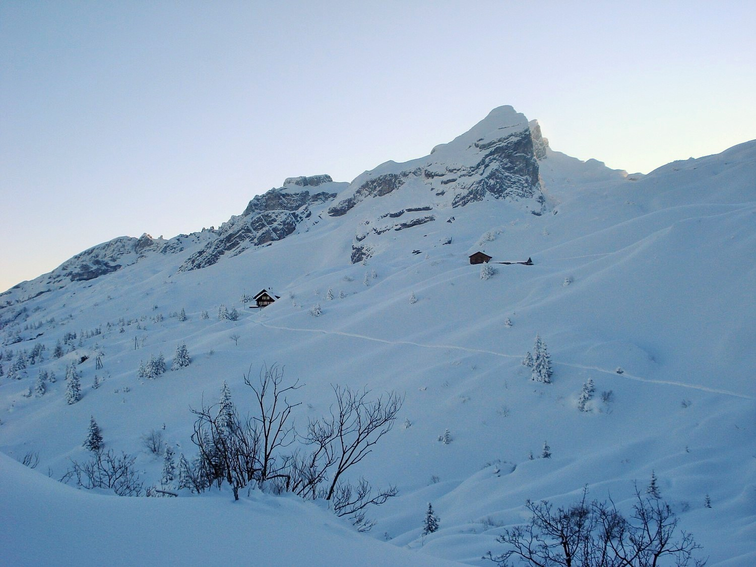 Lidernenhütte UR, Schweiz: 2009